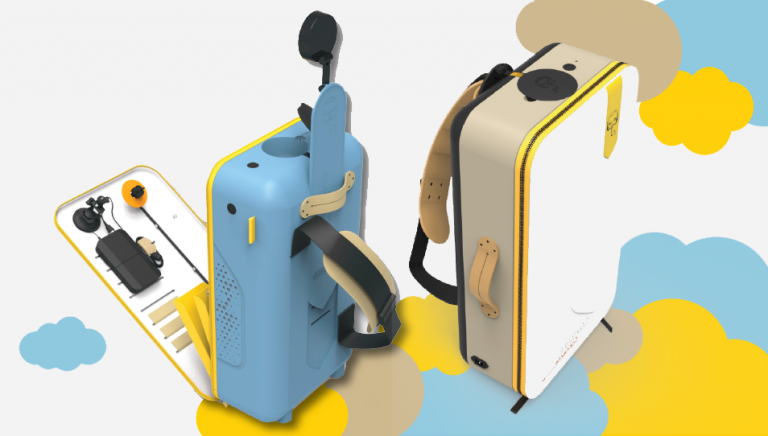 Le Cartable Connecté, par Bibliothèques sans frontières